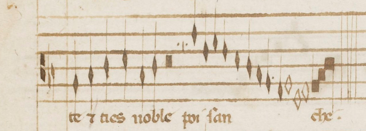 Motet à 3 voix, « En atendant souffrir m’estuet grief payne » de Caserta (BnF, nouvelles acquisitions françaises 6771 n° 183, f° 084v).